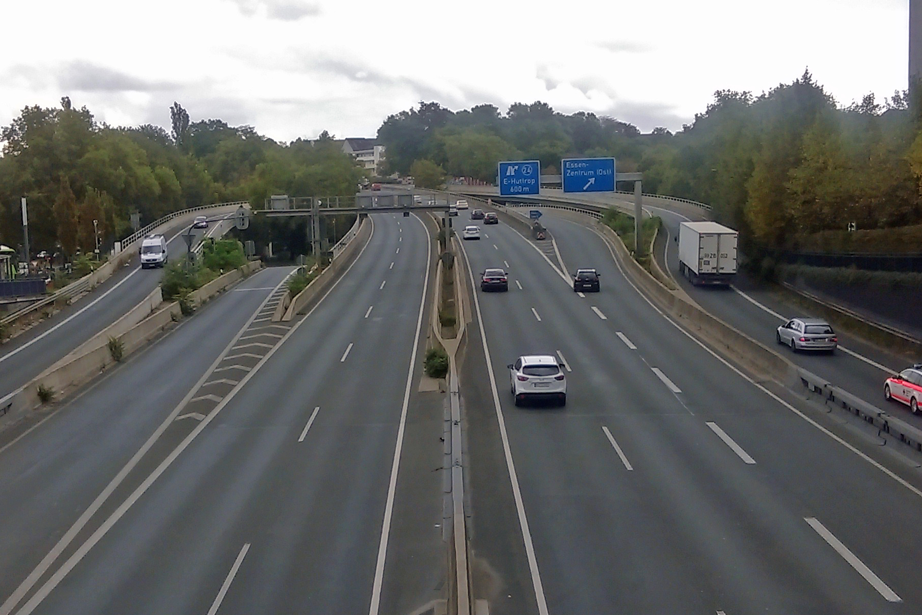 Essen-Südviertel, Helbingbrücke, Bundesautobahn 40